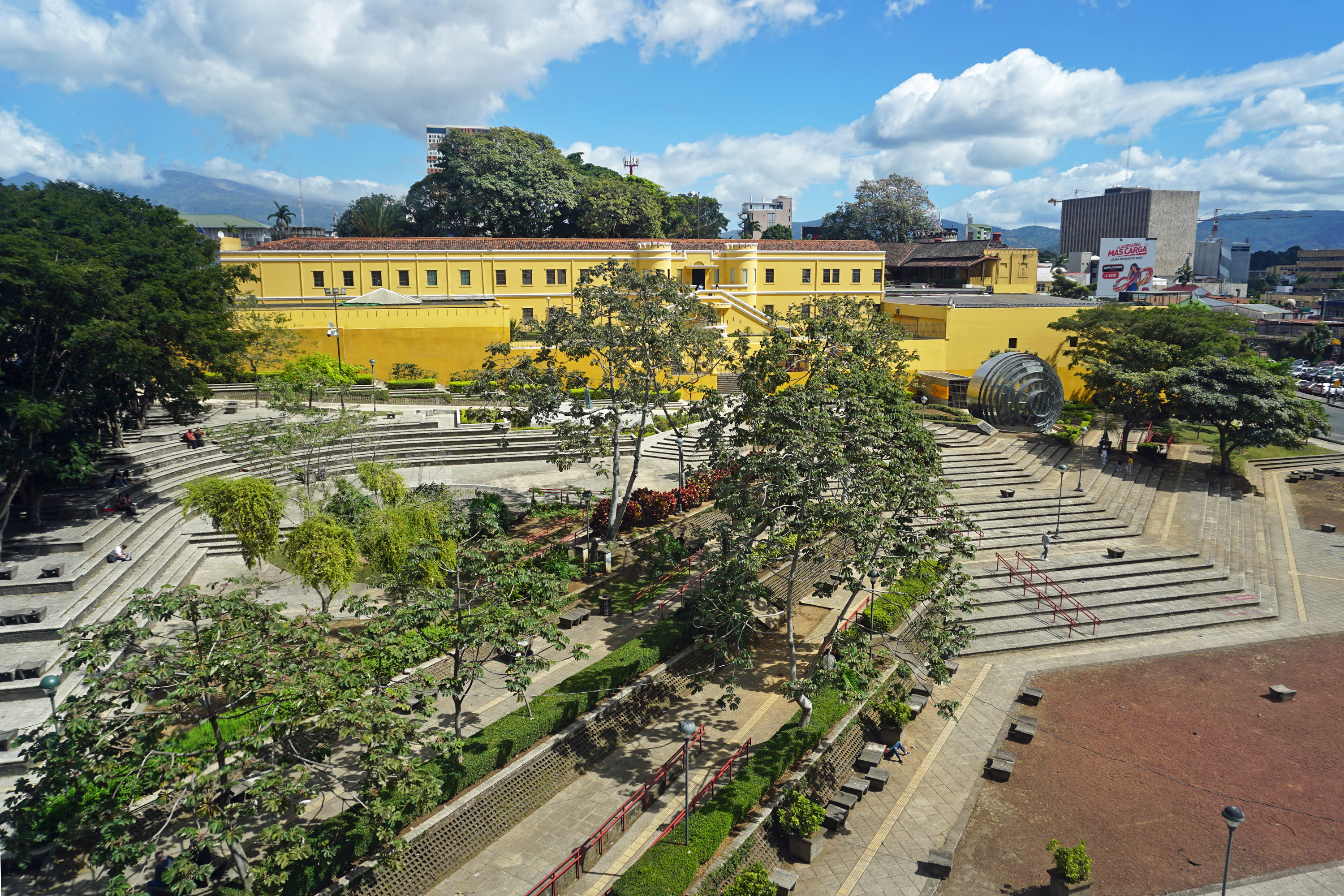 Vista general de la Plaza de la Democracia desde el Museo de Jade del INS. Al fondo el Museo Nacional. San José, Costa Rica